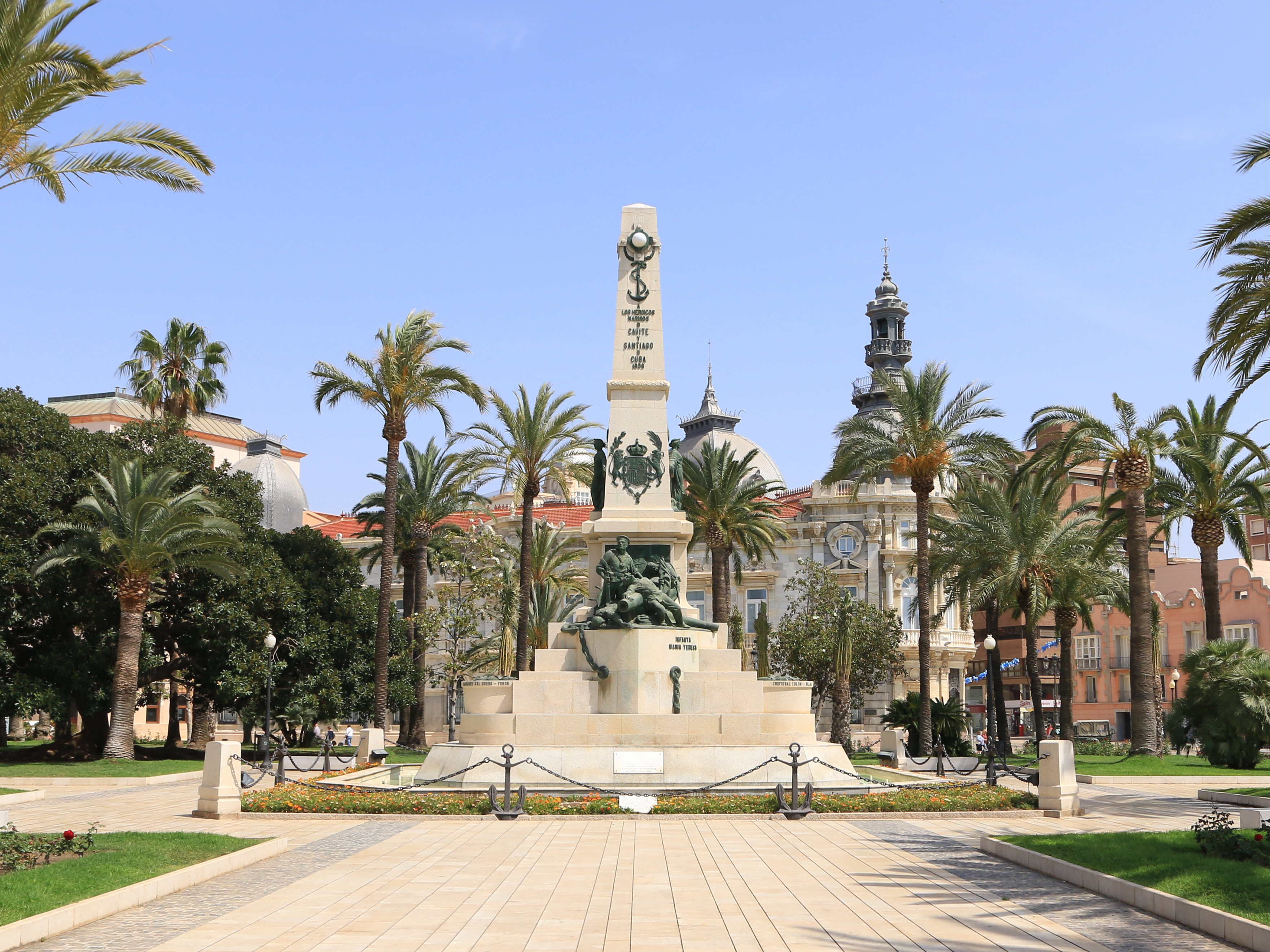 Monument of the heroes of Santiago de Cuba and Cavite - Cartagena in Spain 2016.